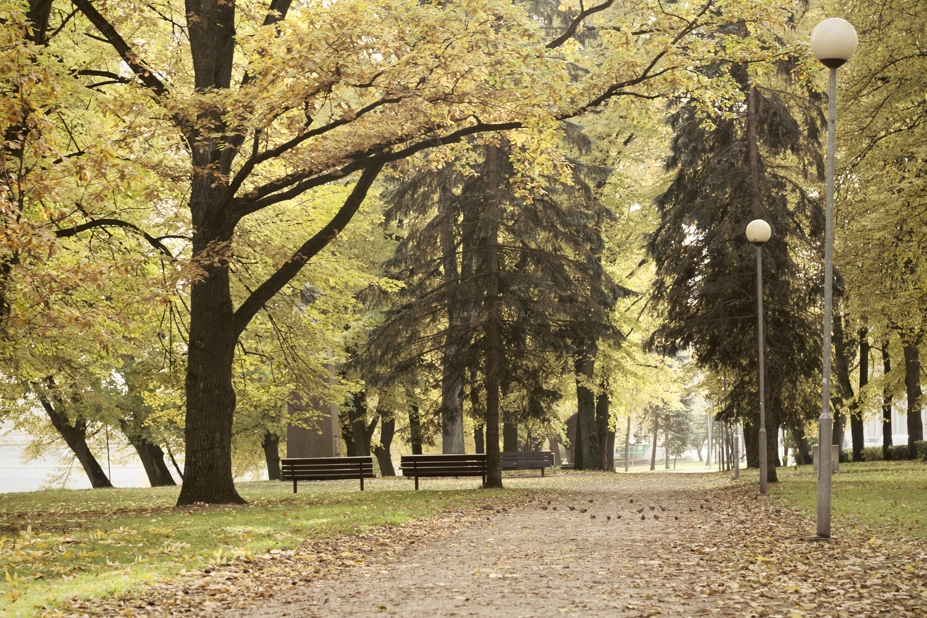 Vabaduse puiestik vaatega Kaarsilla suunas.